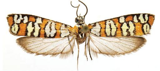 Atteva exquisita